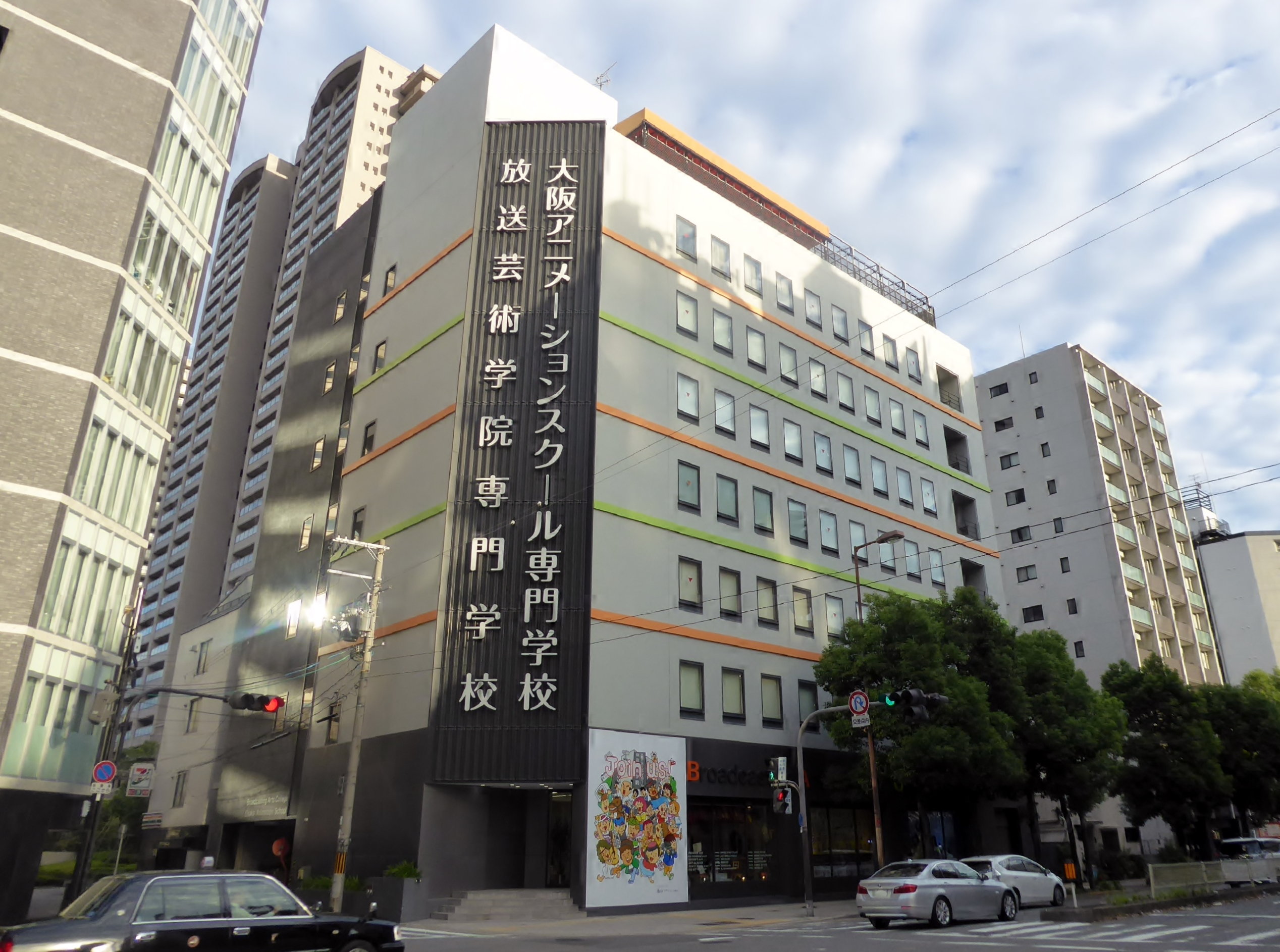 放送芸術学院専門学校を撮影。